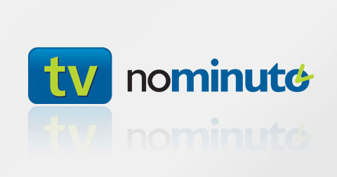 Em 2009, a TV Nominuto entrou no ar com uma programação voltada para o jornalismo.